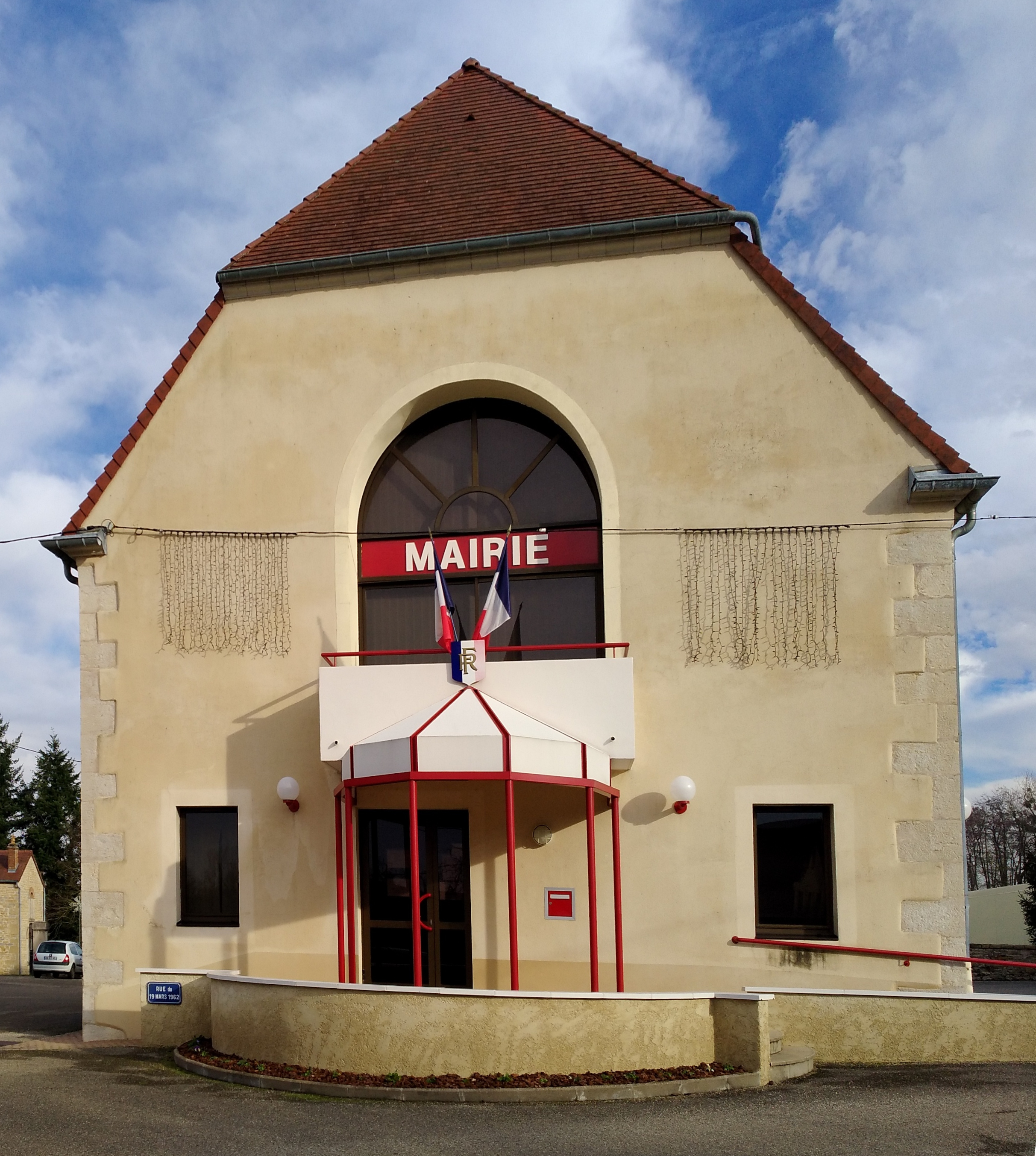 Asnans-Beauvoisin (Jura, France) en janvier 2018.